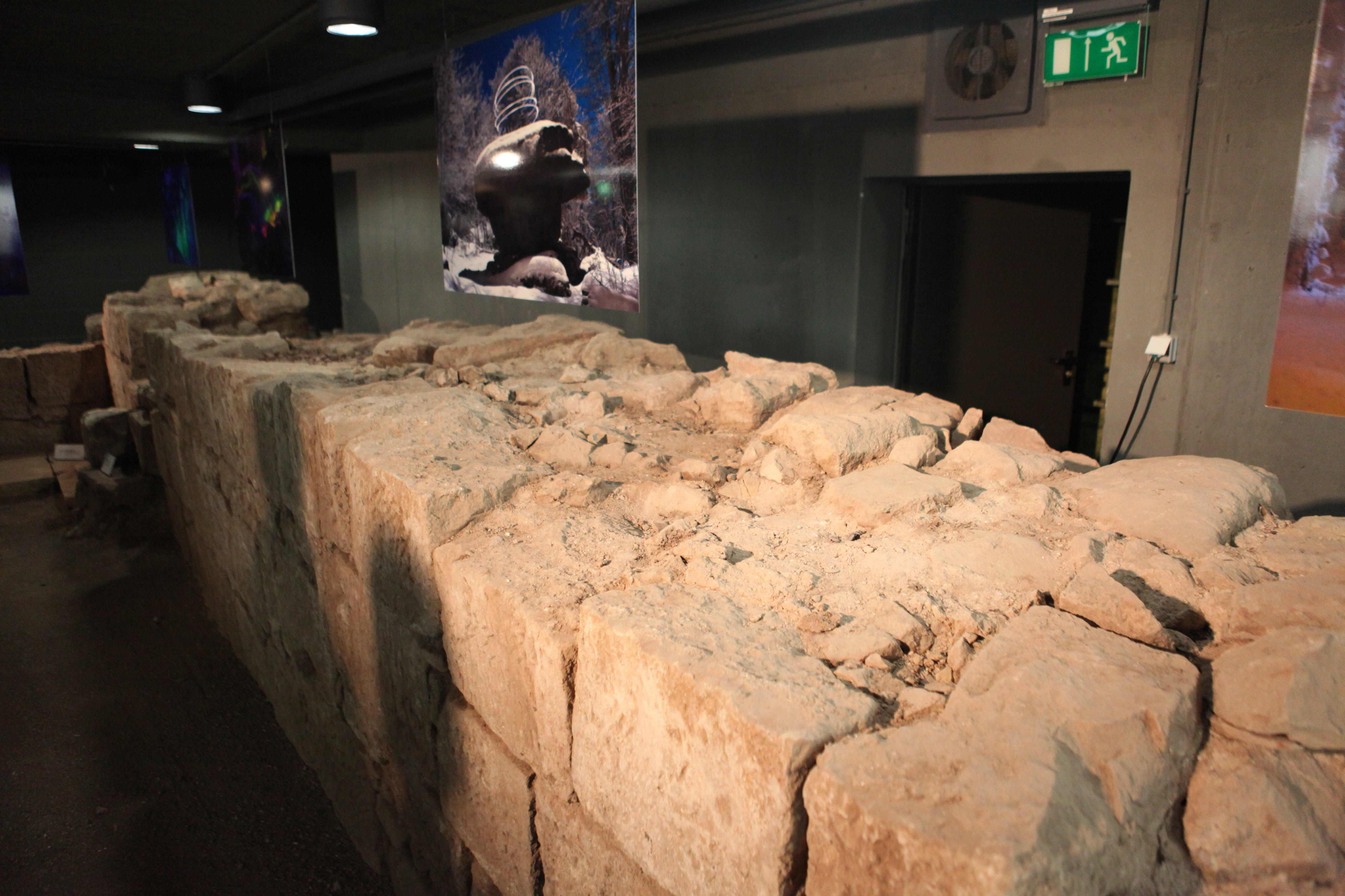 Grabungsmuseum, Steingasse 18, in Coburg